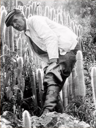 чешский ботаник, кактусист и путешественник Альберт Фрич. Время и место съёмки не до конца ясно. Возможно, этот кадр сделан фотографом-любителем во время одной из последних поездок Фрича в Южную Америку (Северная Аргентина и далее), и его можно датировать серединой 1920-х годов. Вокруг Фрича клейстокактусы, эспостоа, цефалоцереусы... (или что-то в подобном роде).